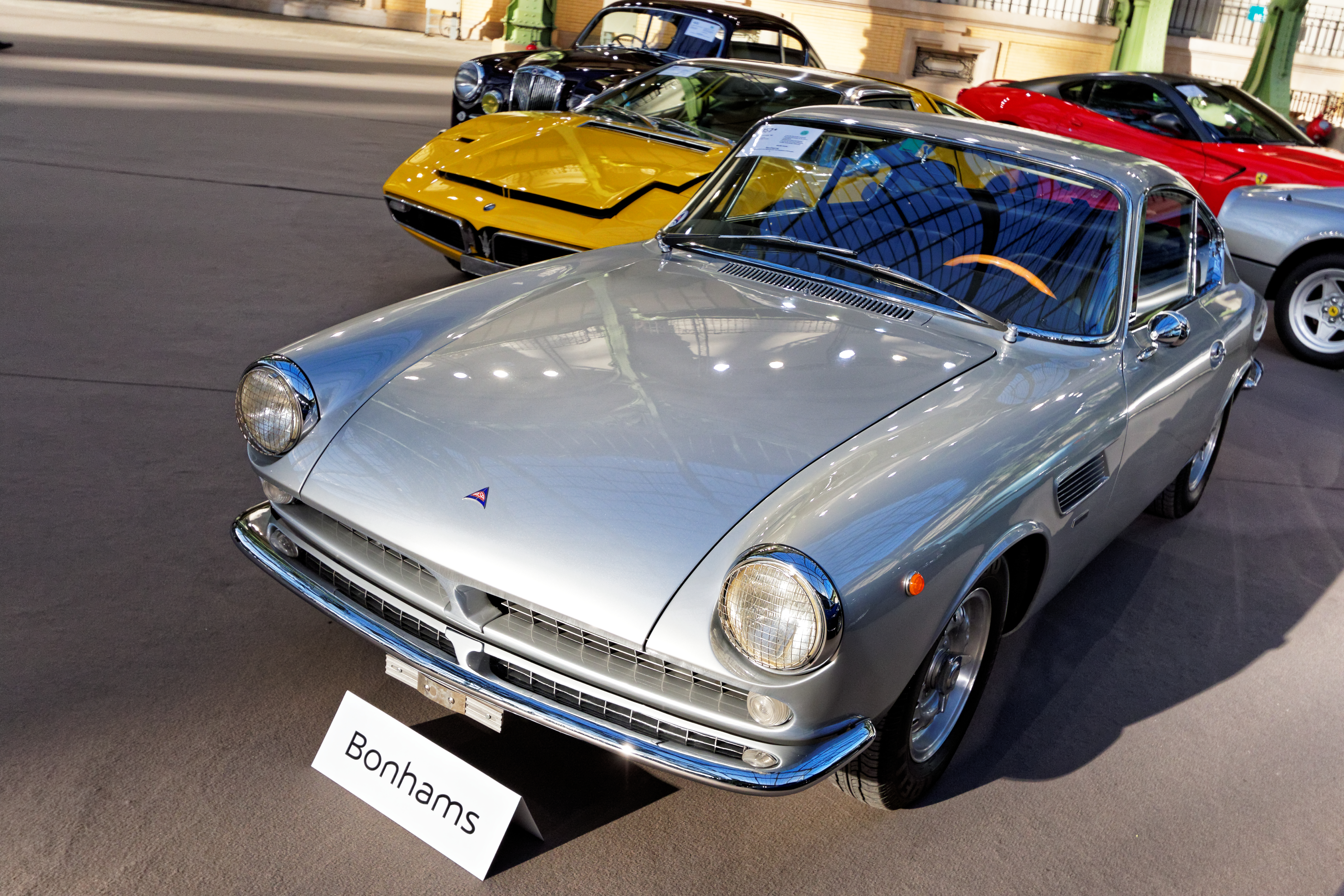 Un des véhicules présenté lors de la vente aux enchères Bonhams 2016 au Grand Palais de Paris.